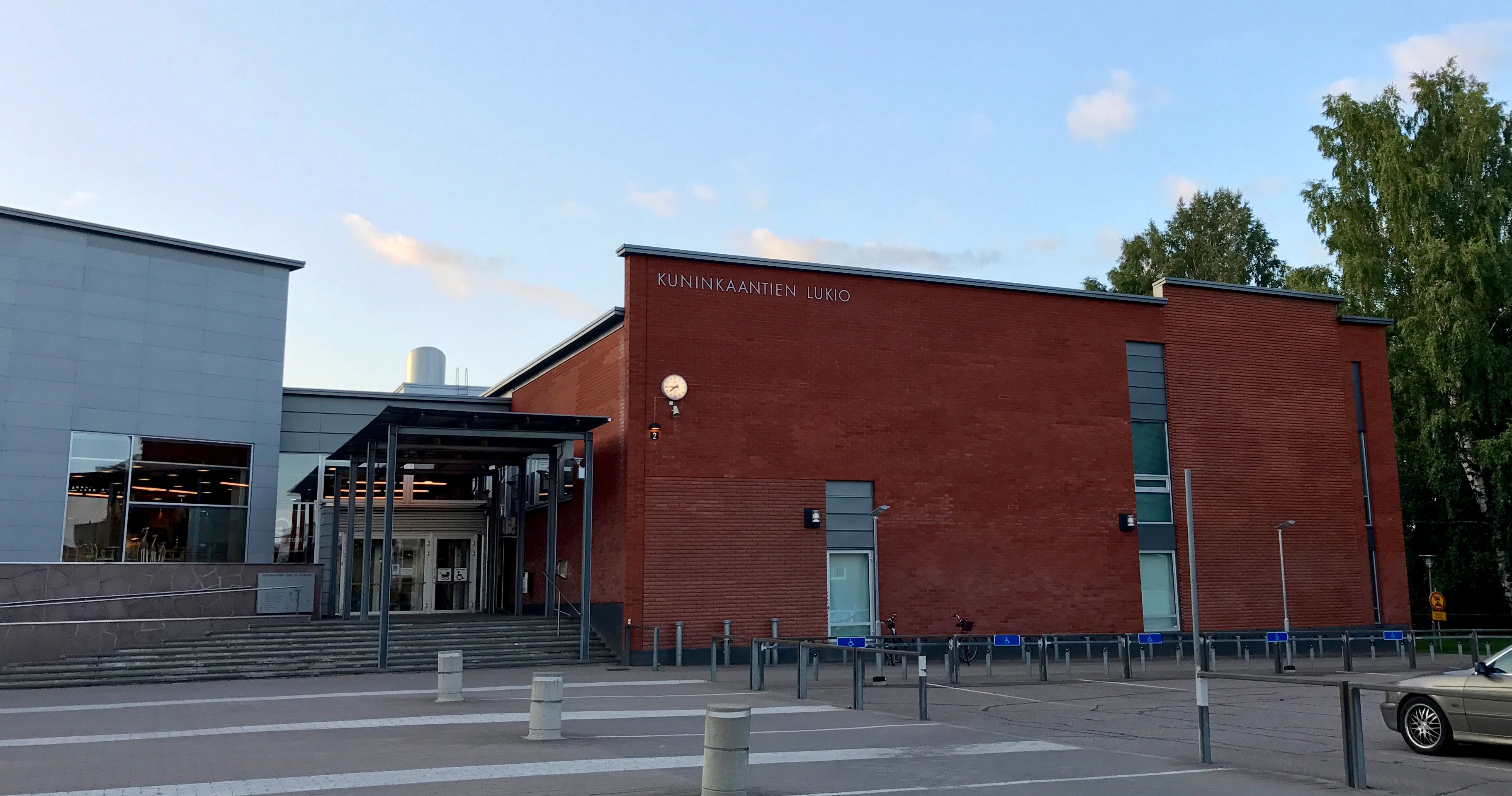 Kuninkaantien lukio Espoossa.